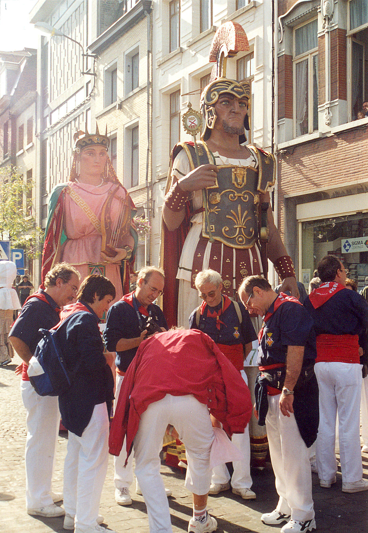 Roc et Eulalia, géants de Hospitalet de LLobregat